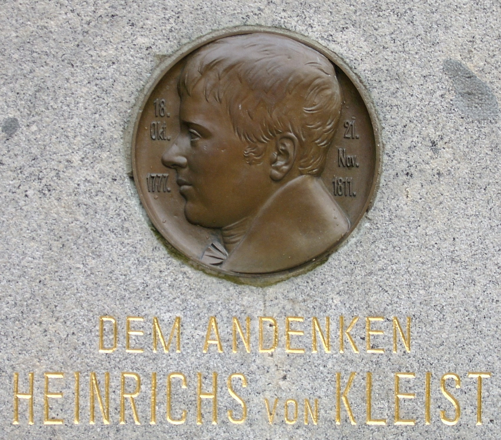 Plakette am Denkmal Heinrich von Kleists in Frankfurt (Oder). Das Denkmal von Gottlieb Elster steht im Park nördlich der Gertraudenkirche. Errichtet wurde es 1910. Mehr Informationen siehe Denkmäler in Frankfurt (Oder)